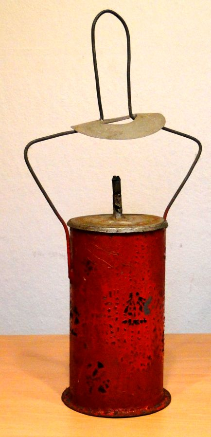 Zelfgemaakte carbidlamp uit WO2. In bezit bij het de stichting Geheugen van Plan Zuid.